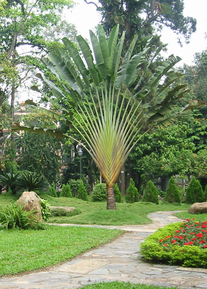 Hình cây quạt chuối do tôi tự chụp và chất lên trên mạng cùng trao cho cộng đồng dưới giấy phép GFDL